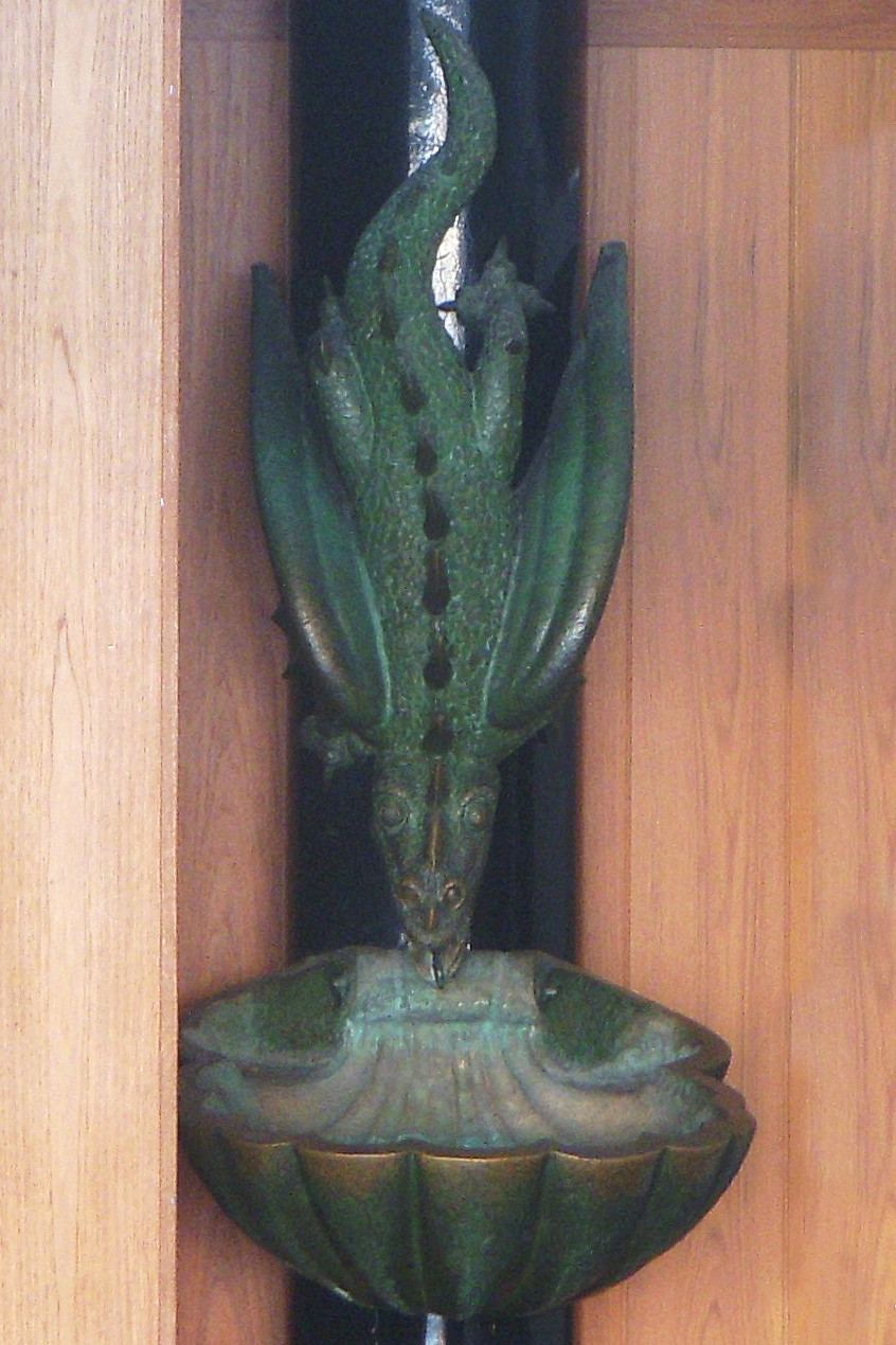 Biograf Draken i Stockholm, dricksfontänen av Gösta Fredberg